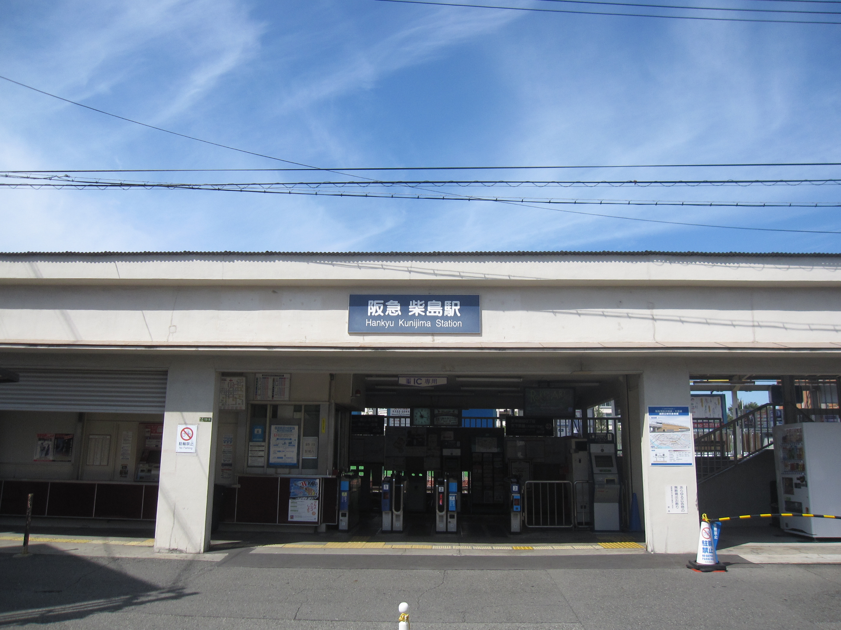 阪急 柴島駅 Hankyu Kunijima Sta.